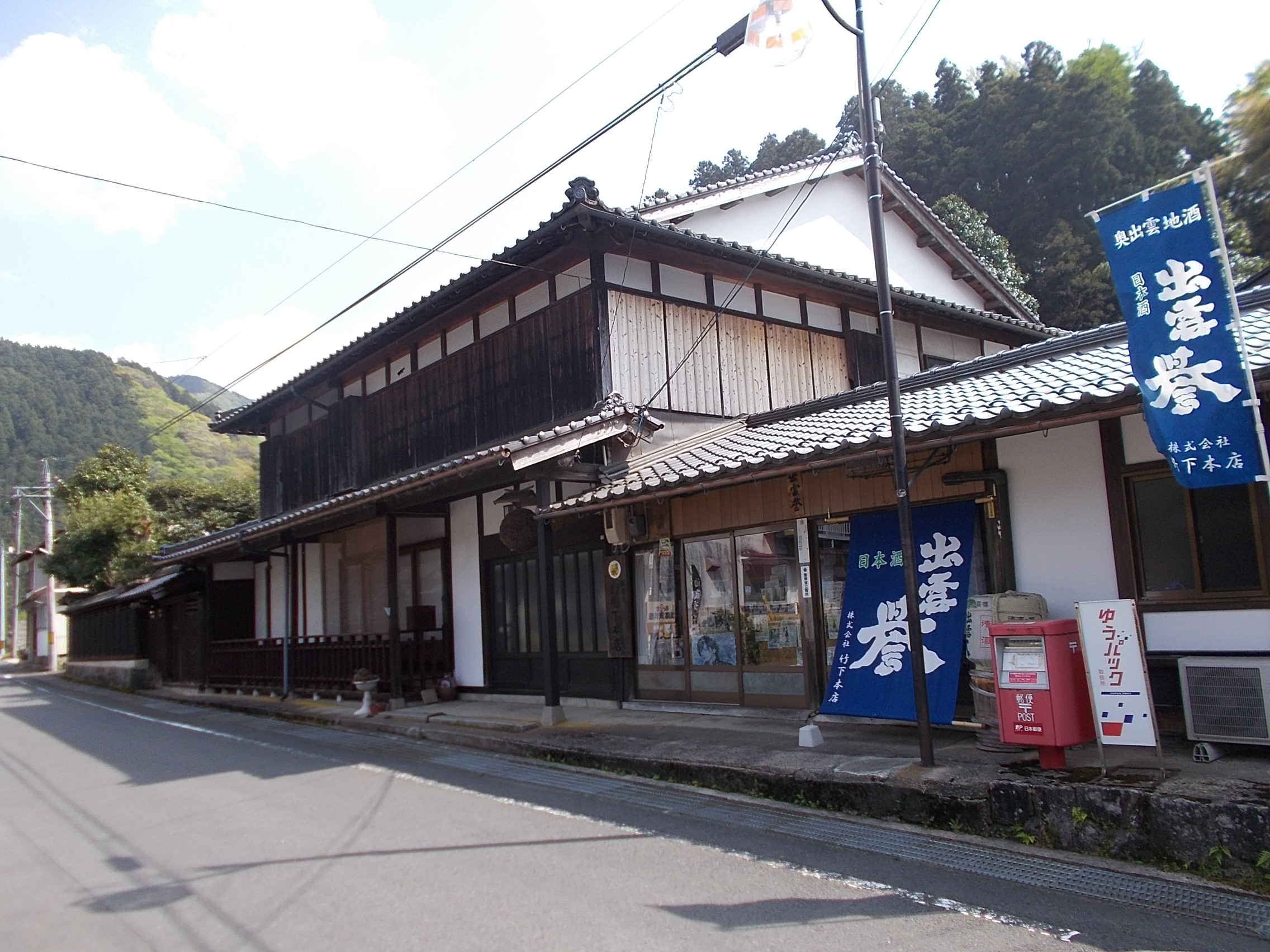 竹下家住宅と竹下本店店舗、